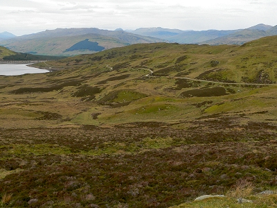 Landschaft am Rob Roy Way. Bei Killin, Schottland.